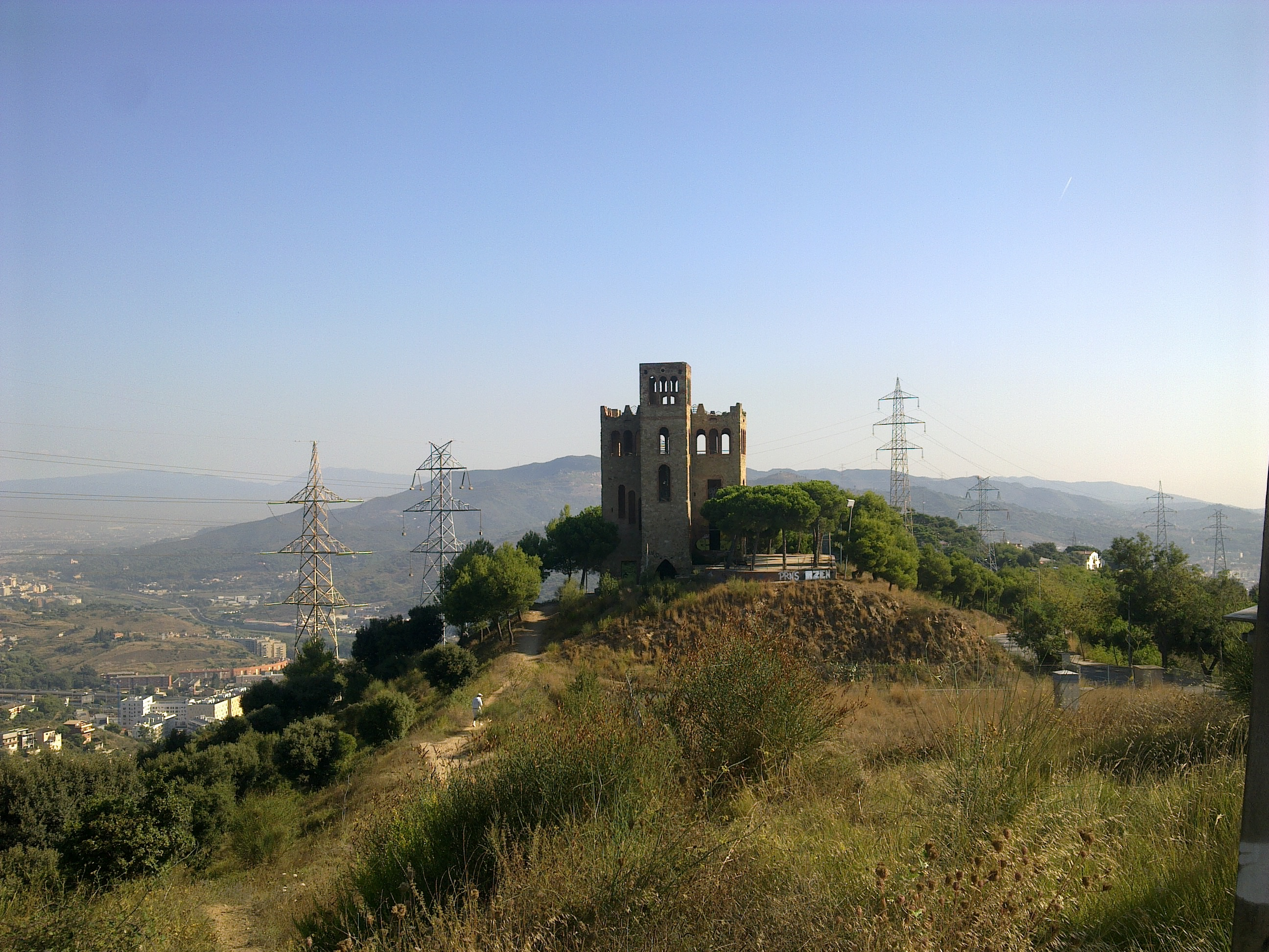 Barcelona